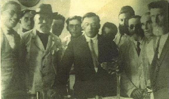 זאב ז'בוטינסקי ומנחם אוסישקין במלון מרכזי שפירא, עפולה